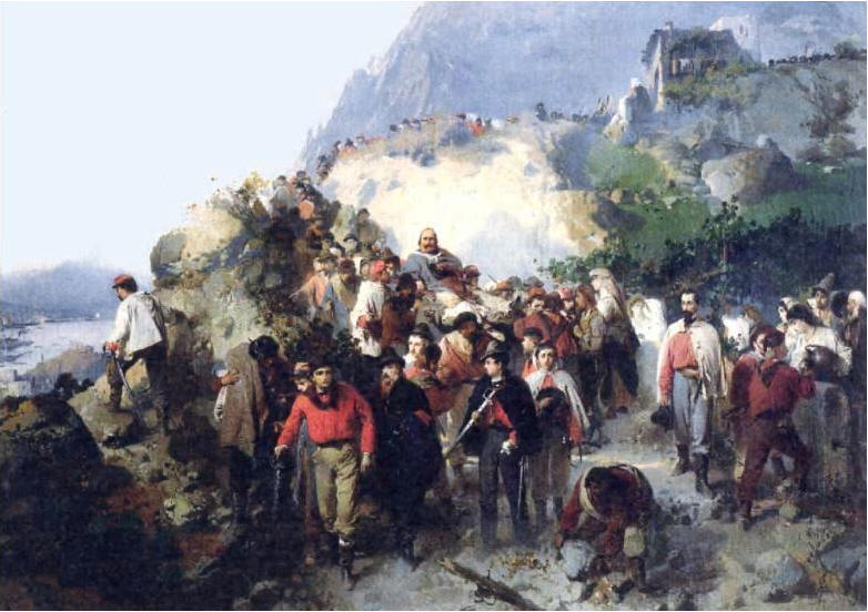 Garibaldi blessé à la bataille de l'Aspromonte, 29 août 1862. Huile sur toile